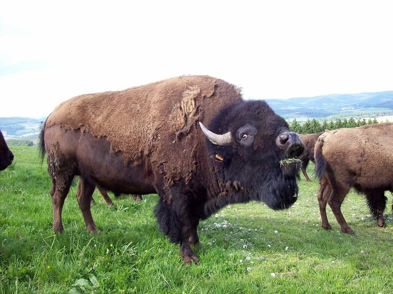 Amerikanischer Bison (Bison bison) in Schmallenberg-Werpe (Germany)